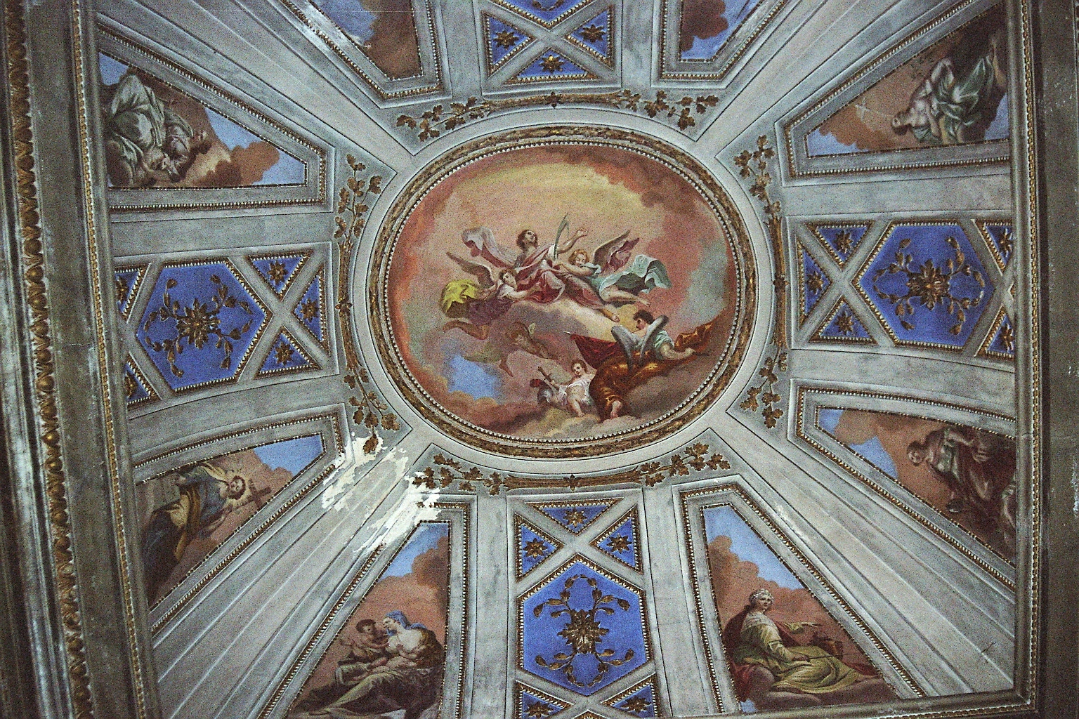 Fara Novarese (NO), Oratorio Scurolo di San Damiano: Decorazione della volta.